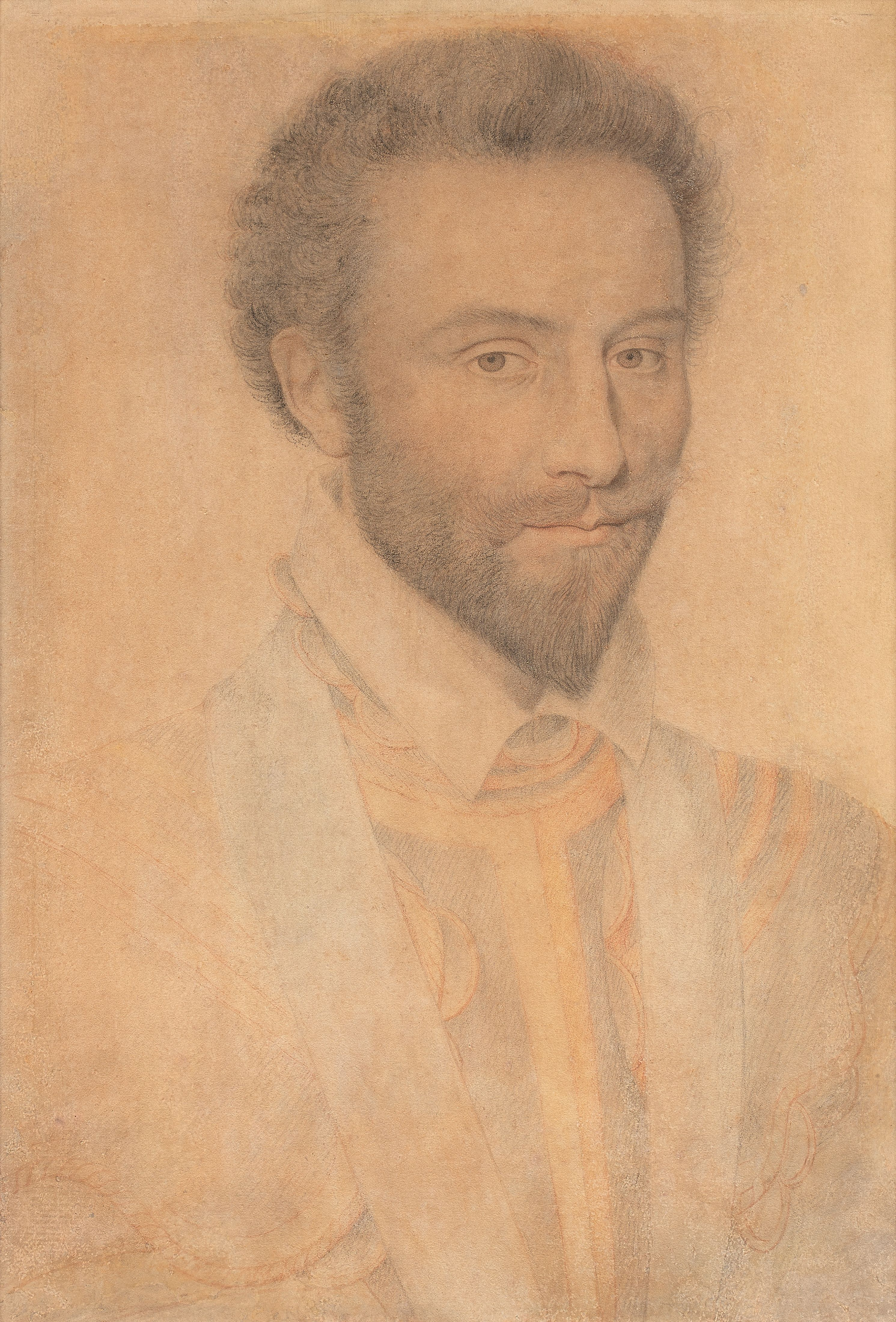 Portrait de Bernard de Nogaret de la Valette (1553-1592), amiral de France.